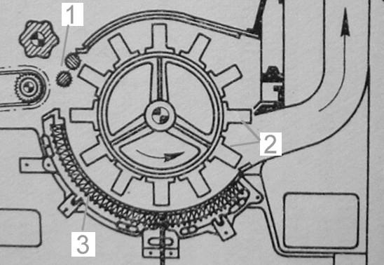 Schema: Horizontalöffner Česky: Nakres vodorovneho cechradla